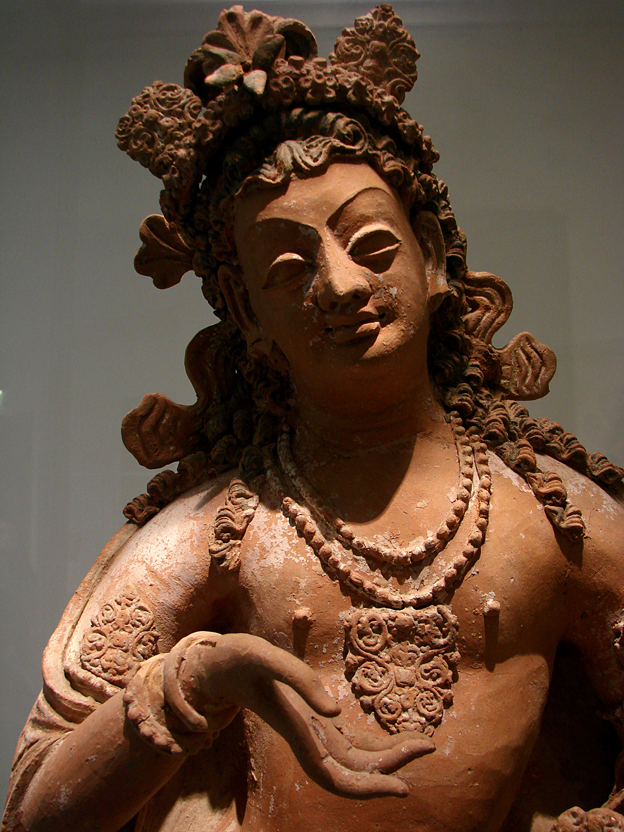 Bodhisattva, Afghanistan, vallée du Ghorband, monastère de Fondukistan, niche D, 7ème siècle, terre. Musée Guimet, Paris.